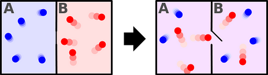 Иллюстрация к описанию парадокса Гиббса